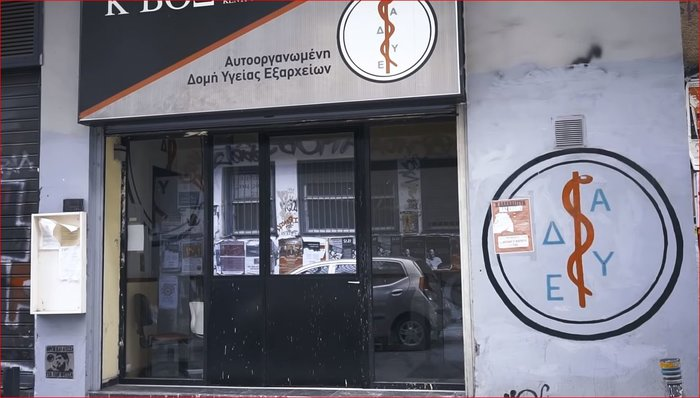 Είσοδος Αυτοοργανωμένης δομής υγείας Εξαρχείων (Α.Δ.Υ.Ε.)